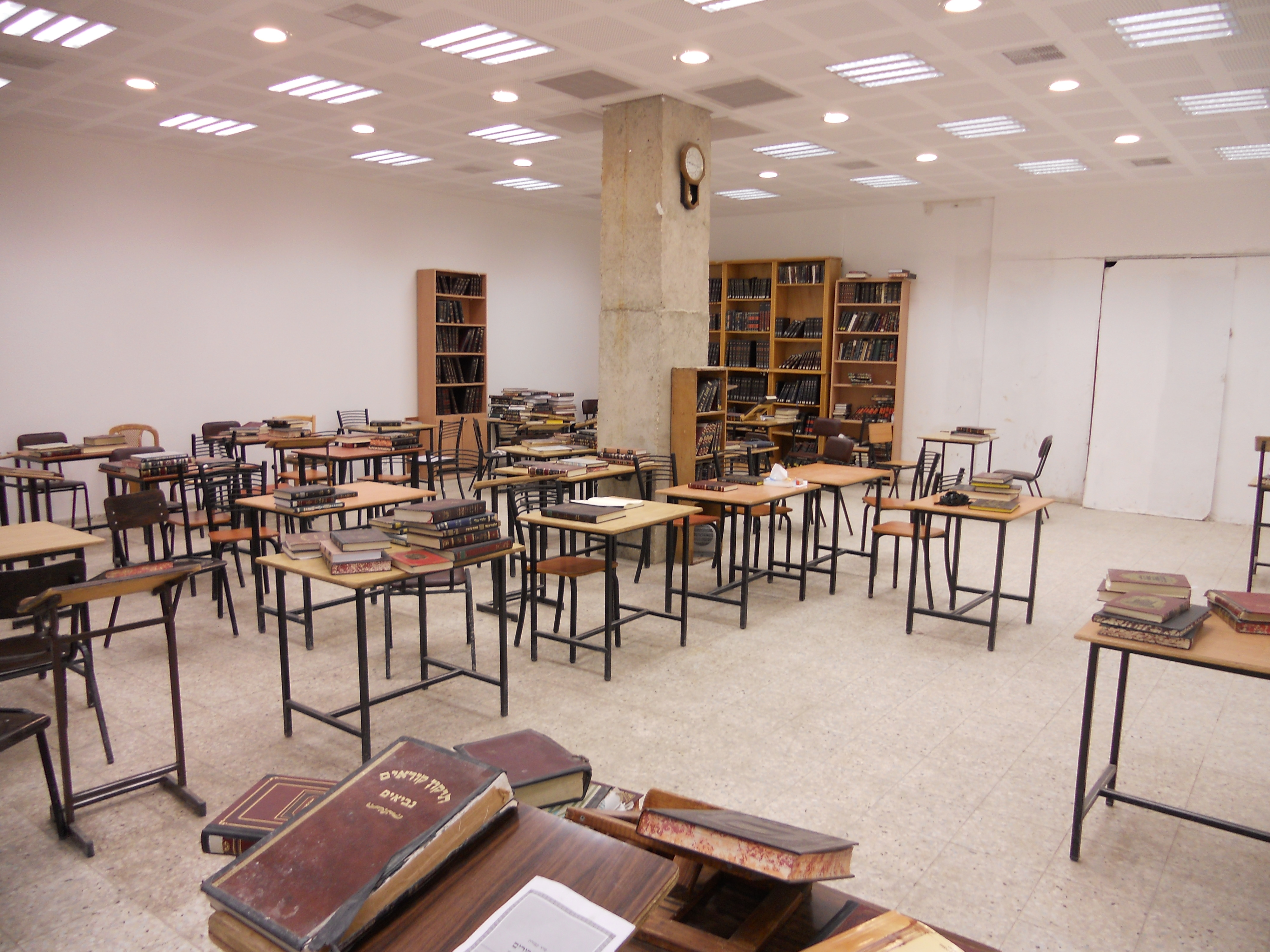 בית המדרש של ישיבת אדרת אליהו, נבנה בניסן תשע"ב